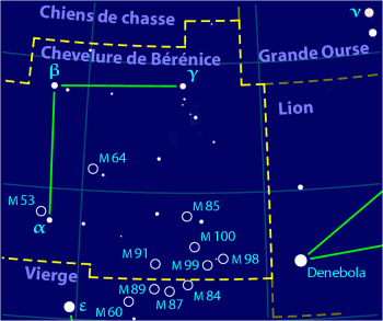 description Carte pour la constellation de la Chevelure de Bérénice source produite à l'aide du logiciel PP3 de copyright